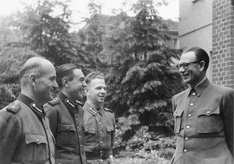 General Wlassow mit russischen Freiwilligen Dabendorf 1944